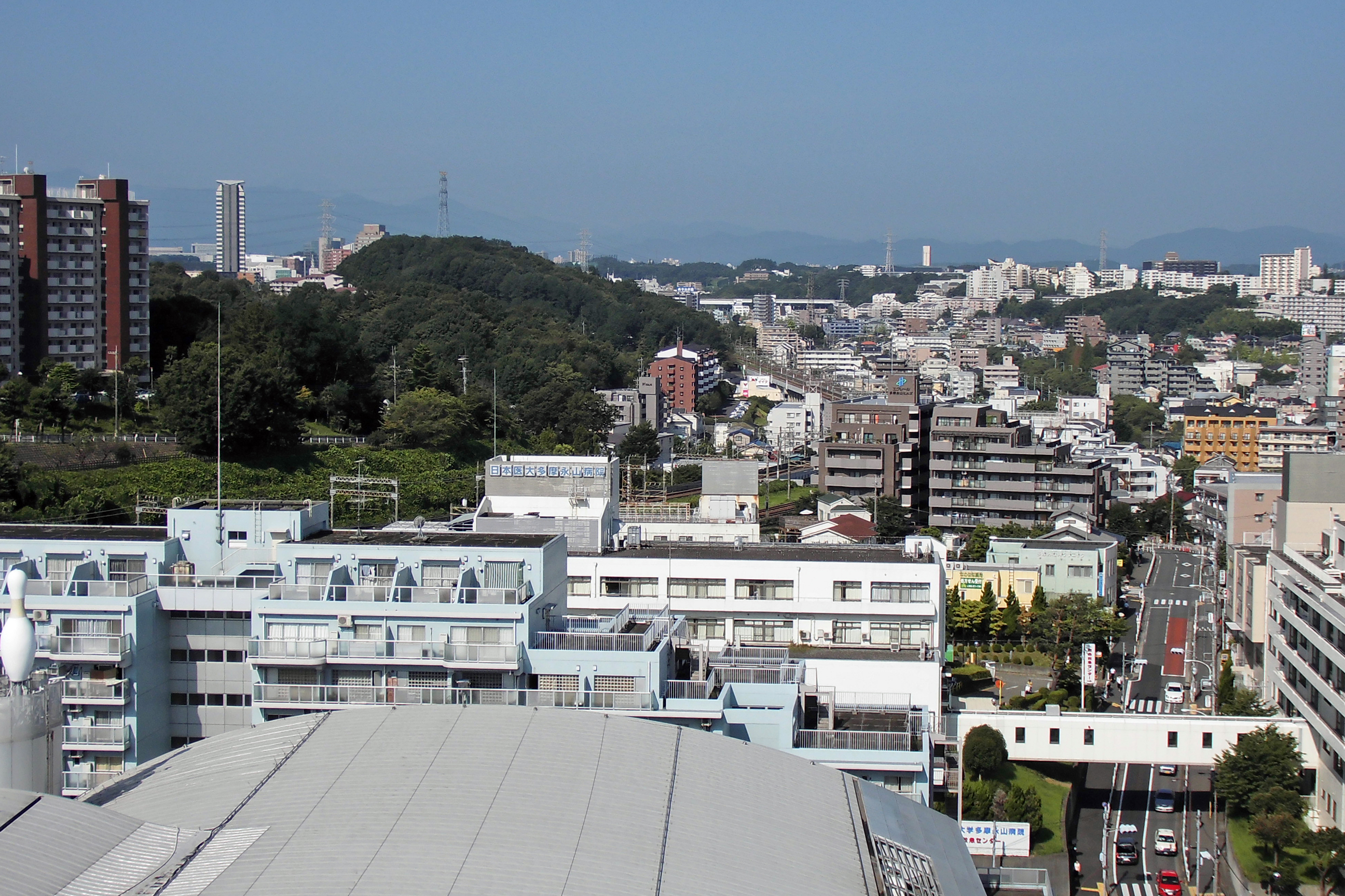 マンション高層階より多摩市の谷戸部の市街地130807